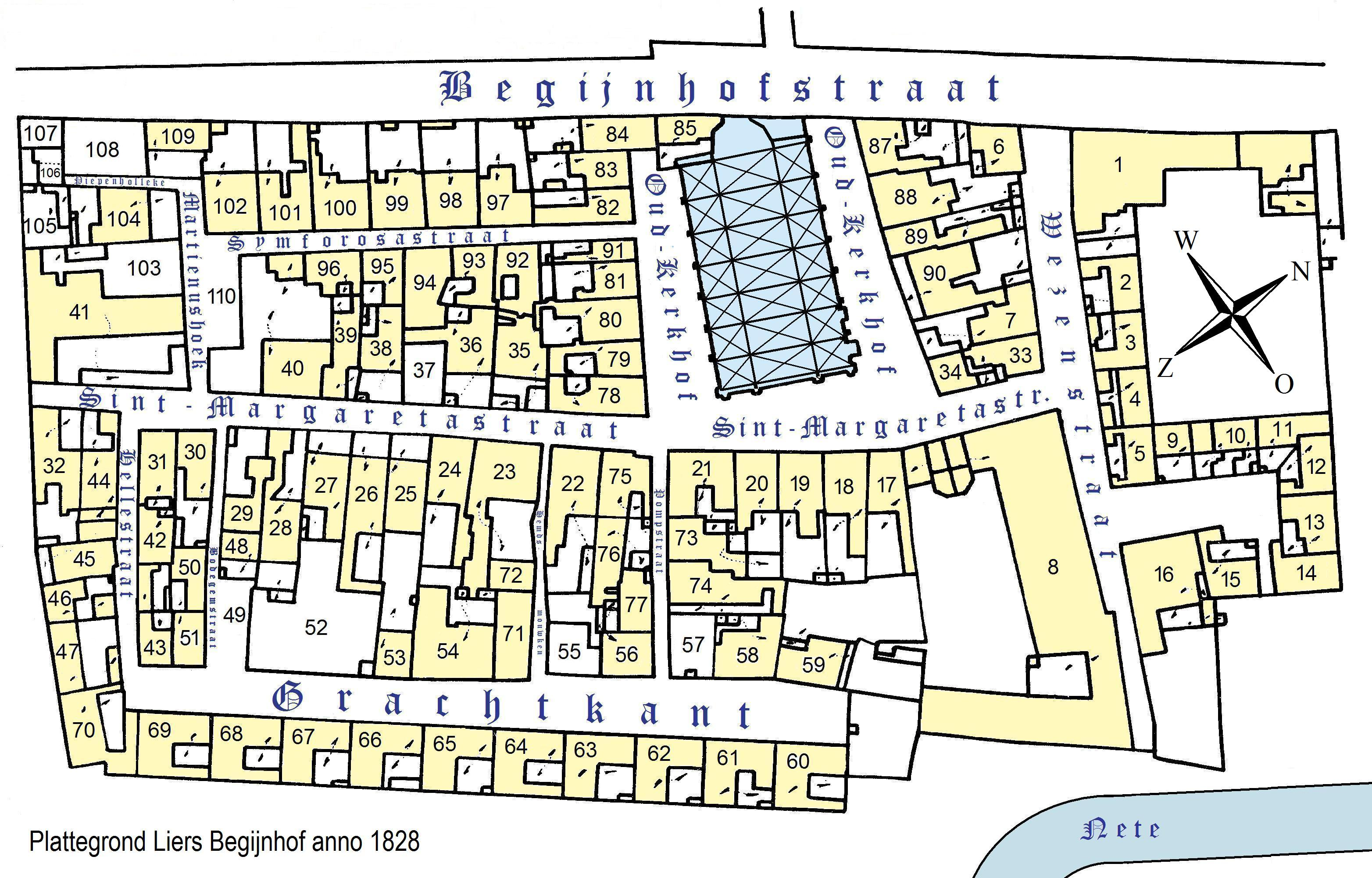 Lierre, ville de Belgique (prov. d’Anvers), à 15km env. au sud-est de la ville d’Anvers. Plan du béguinage, d’après un plan cadastral de 1828. La numérotation des parcelles est celle de l’ouvrage de Jos Mortelmans, Het Lierse Begijnhof (éd. à compte d’auteur, Lierre 1974). Les zones bâties sont représentées en jaune. N.B.: le plan reflète la situation de 1828, non l’actuelle : un certain nombre de bâtiments ont en effet été démolis ou détruits entre-temps. La liste ci-dessous recense les bâtiments du béguinage, groupés par rue, avec indication du n° d’immeuble, du nom traditionnel en néerl. (traduction cf. article) et, entre parenthèses, du n° de parcelle selon Mortelmans. Les bâtiments démolis sont assortis de la mention verdwenen ('disparu'). Attention : le nord est orienté à droite.